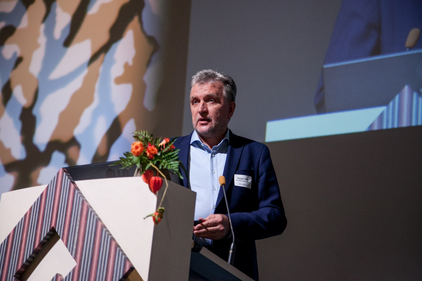 Margus Mets 2016. aasta teaduskommunikatsiooni konverentsil.